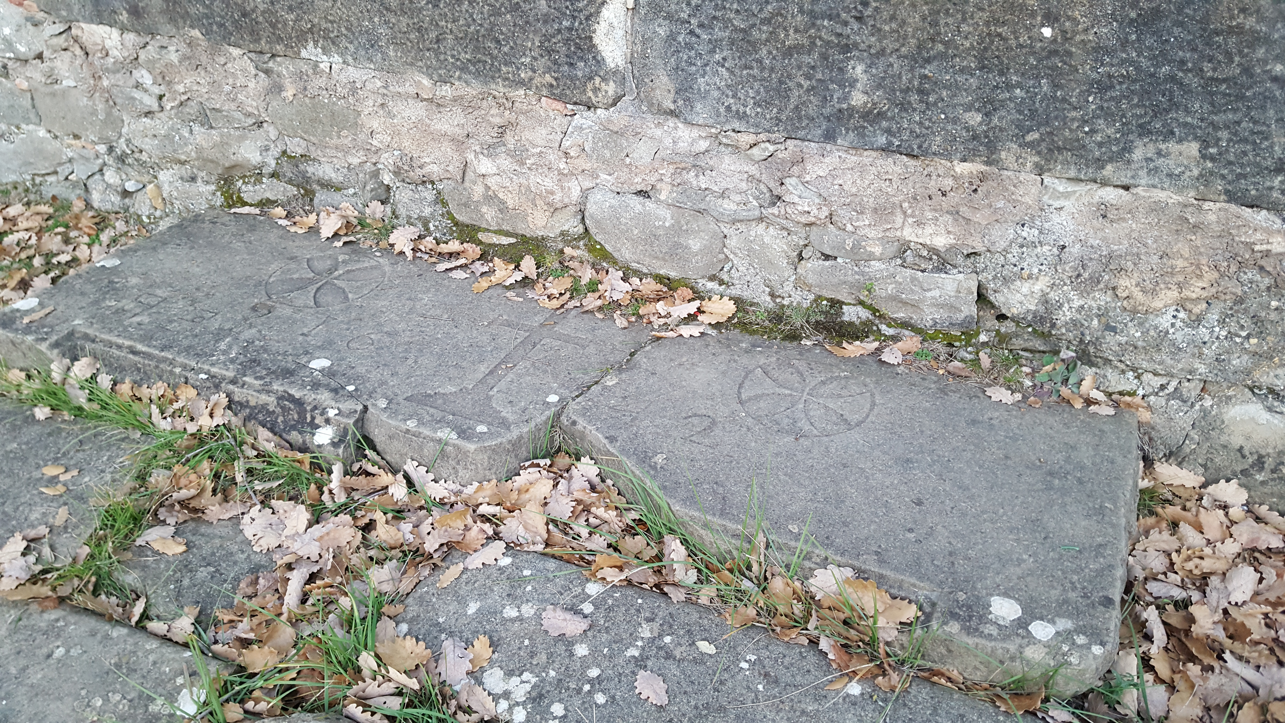 Kapelle Sant Ximpli (Sant Simplici) - Zerbrochener ursprünglicher Türsturz im Eingangsbereich (Hostalets d'en Bas, Katalonien)